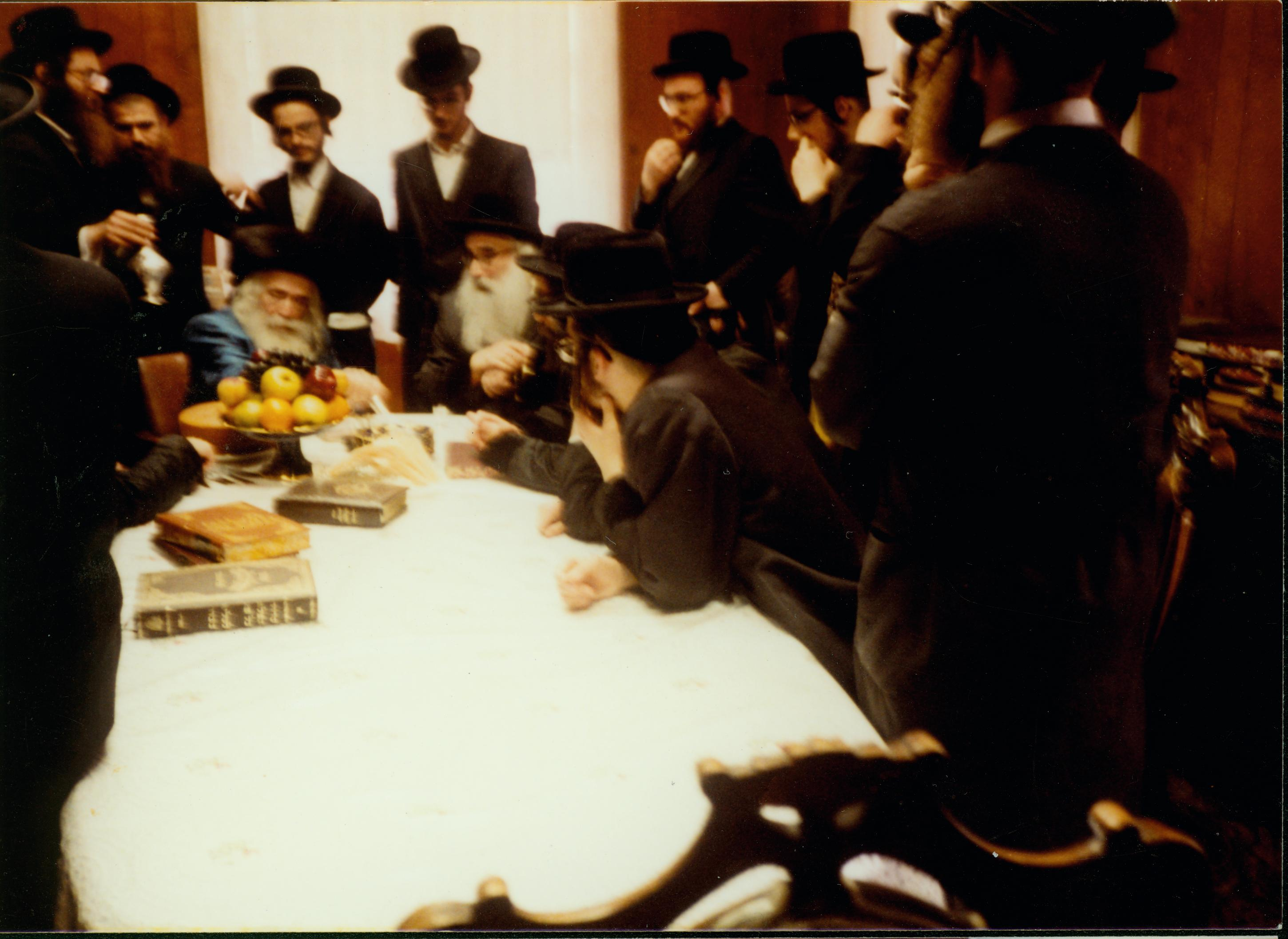 האדמורי"ם בעל השפע חיים מצאנז עם רבי מרדכי הגר מויז'ניץ מונסי